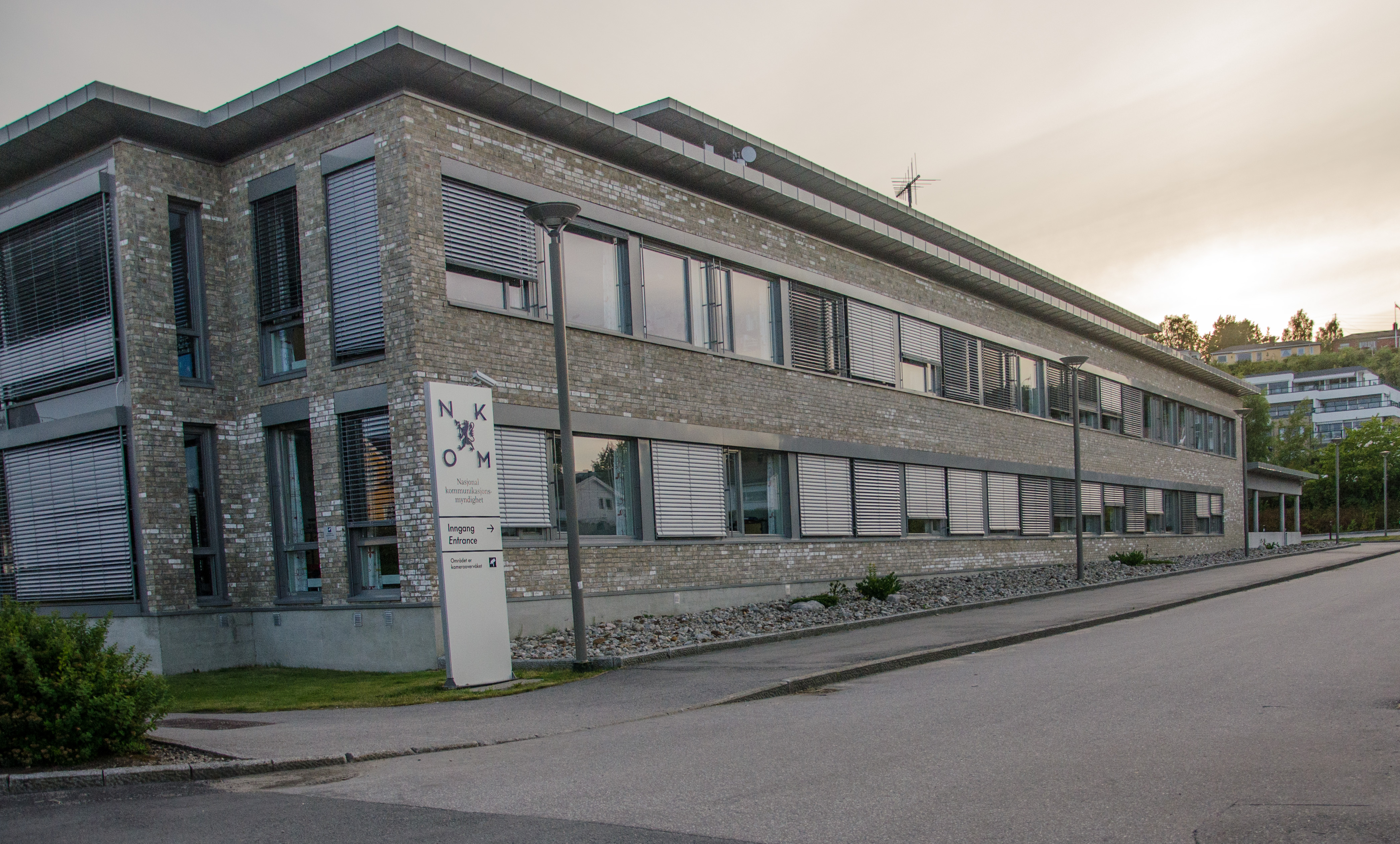 Nasjonal kommunikasjonsmyndighet (NKOM). Hovedkontoret i Lillesand, adresse Nygård 1.